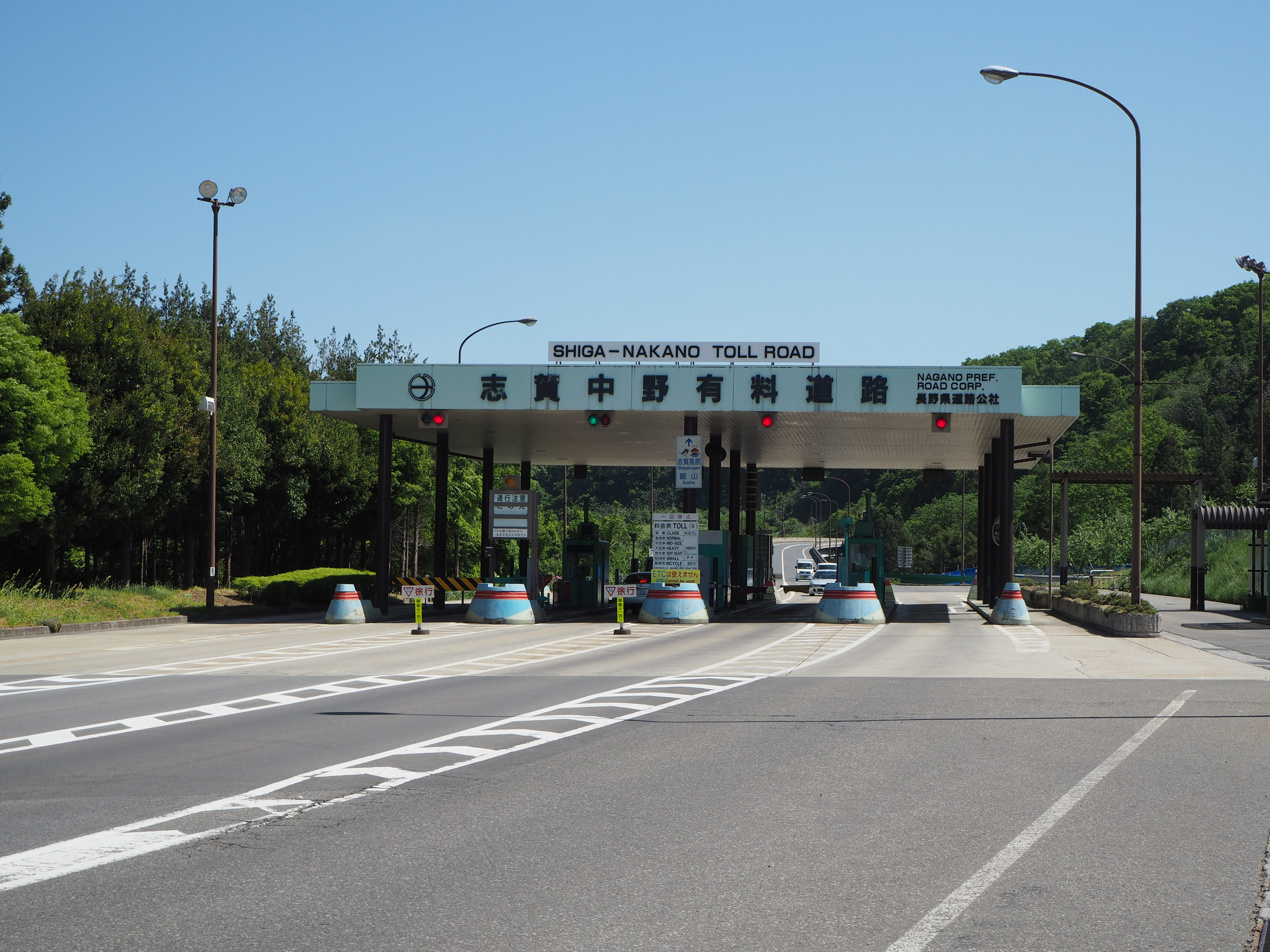 志賀中野道路料金所